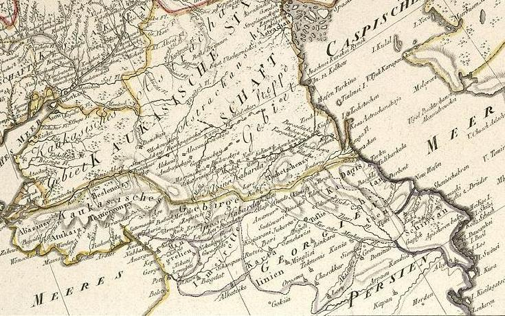 Generalkarte des Russischen Reichs mit der Eintheilung in die neu errichteten Statthalterschaften und Kreise